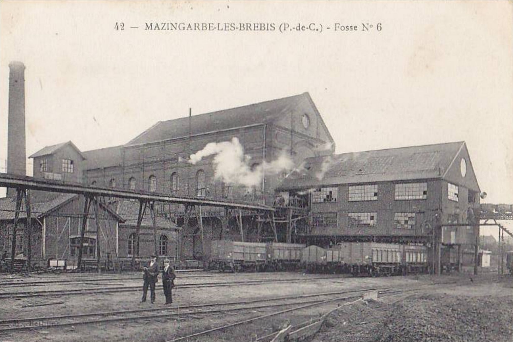 La fosse n° 6 - 6 bis de la Compagnie des mines de Béthune était un charbonnage du bassin minier du Nord-Pas-de-Calais constitué de deux puits situé à Mazingarbe, Pas-de-Calais, Nord-Pas-de-Calais, France.